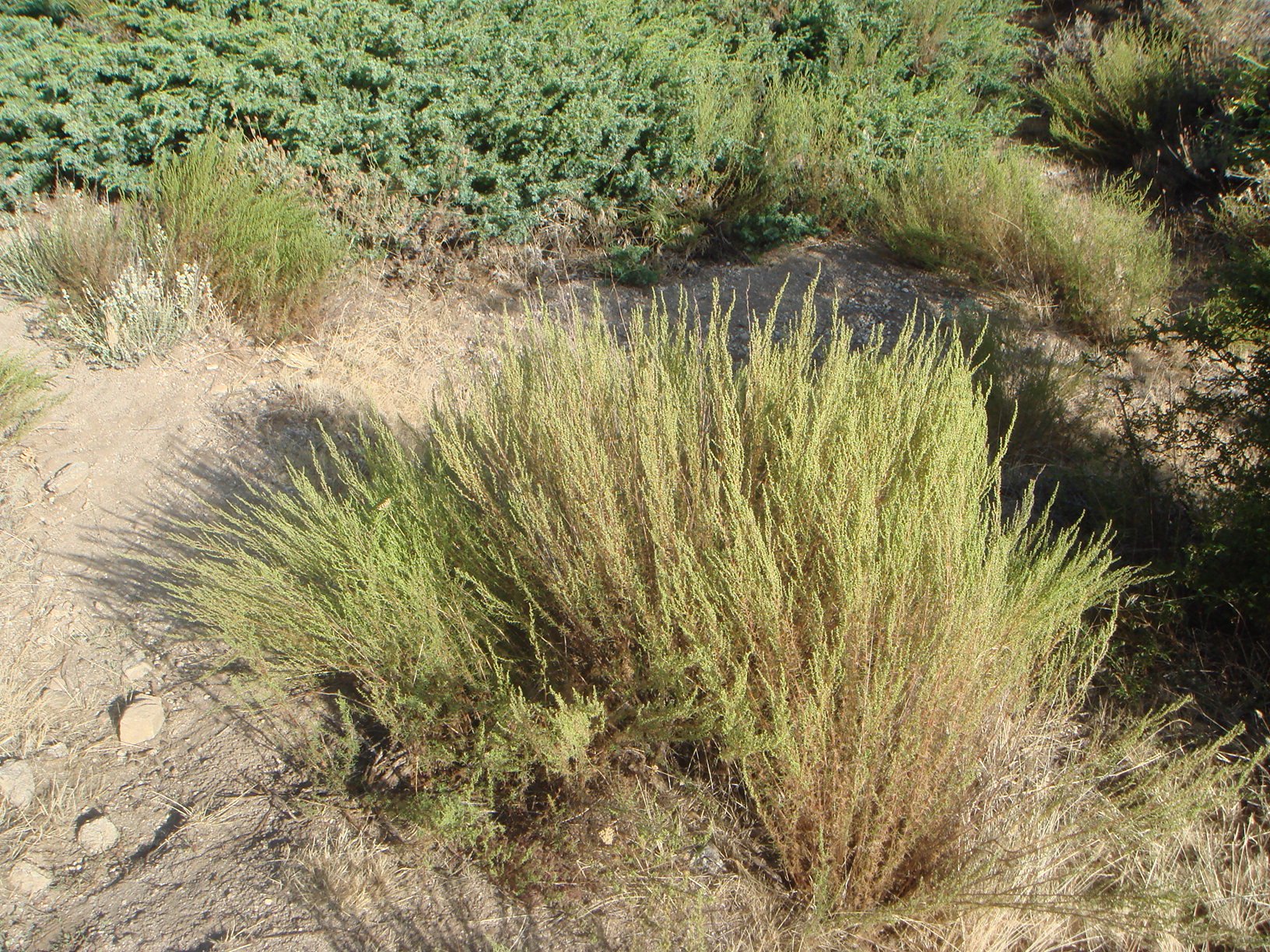 Artemisia campestris subsp. glutinosa, Paramera de Ávila, Villaviciosa (Ávila), España.